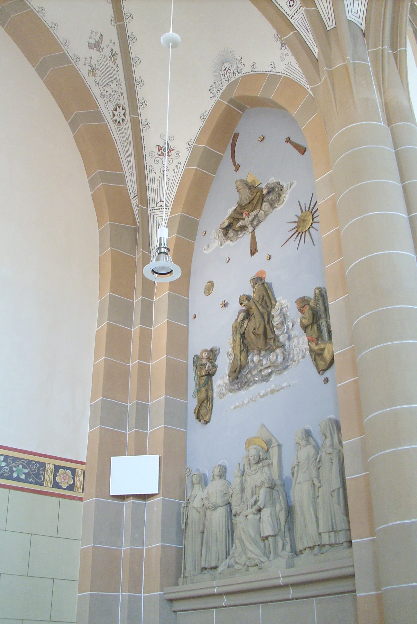 Linke heimatbezogene Wandfläche Pfarrkirche St. Matthäus Bad Sobernheim